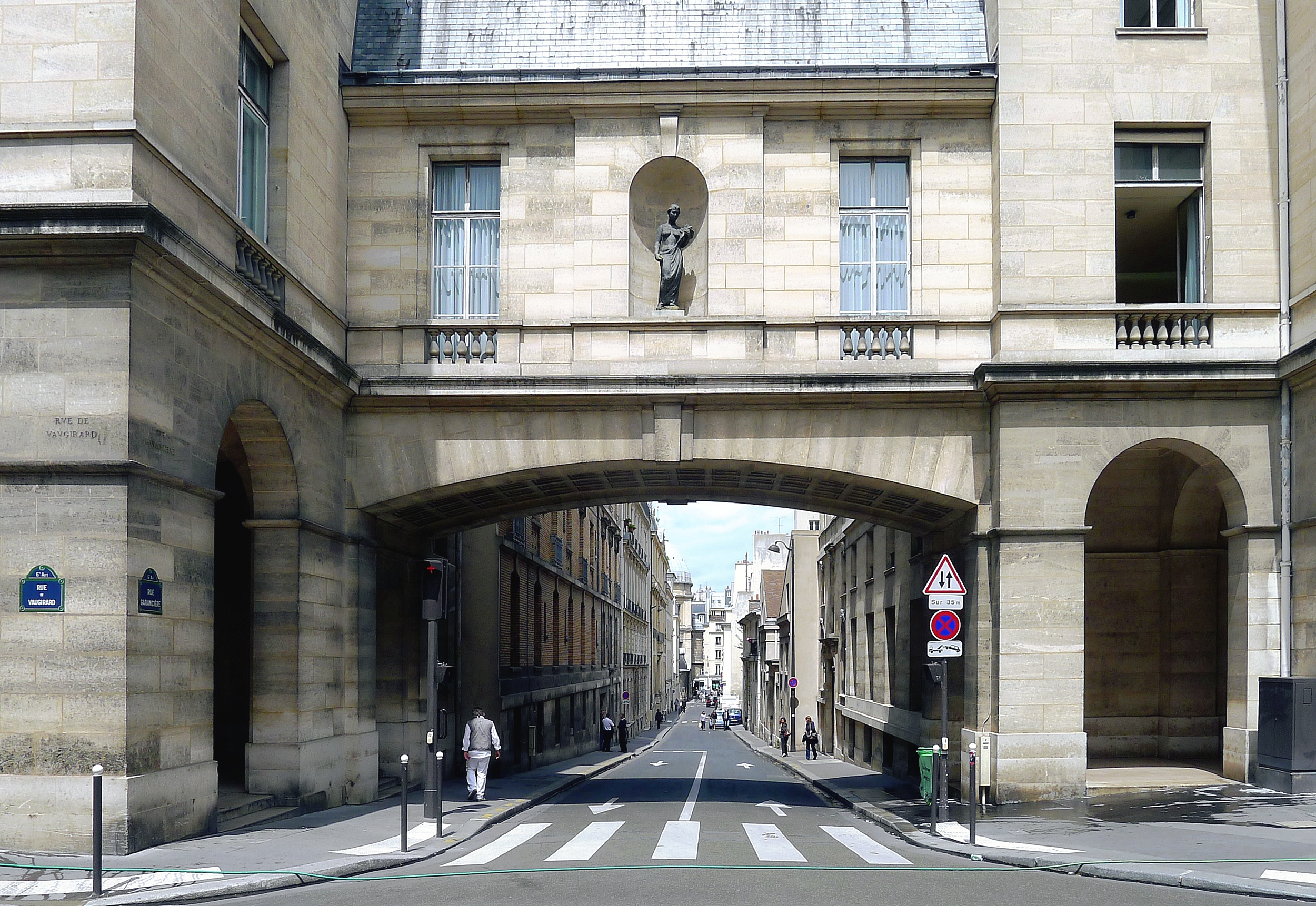 Rue Garancière - Paris VI